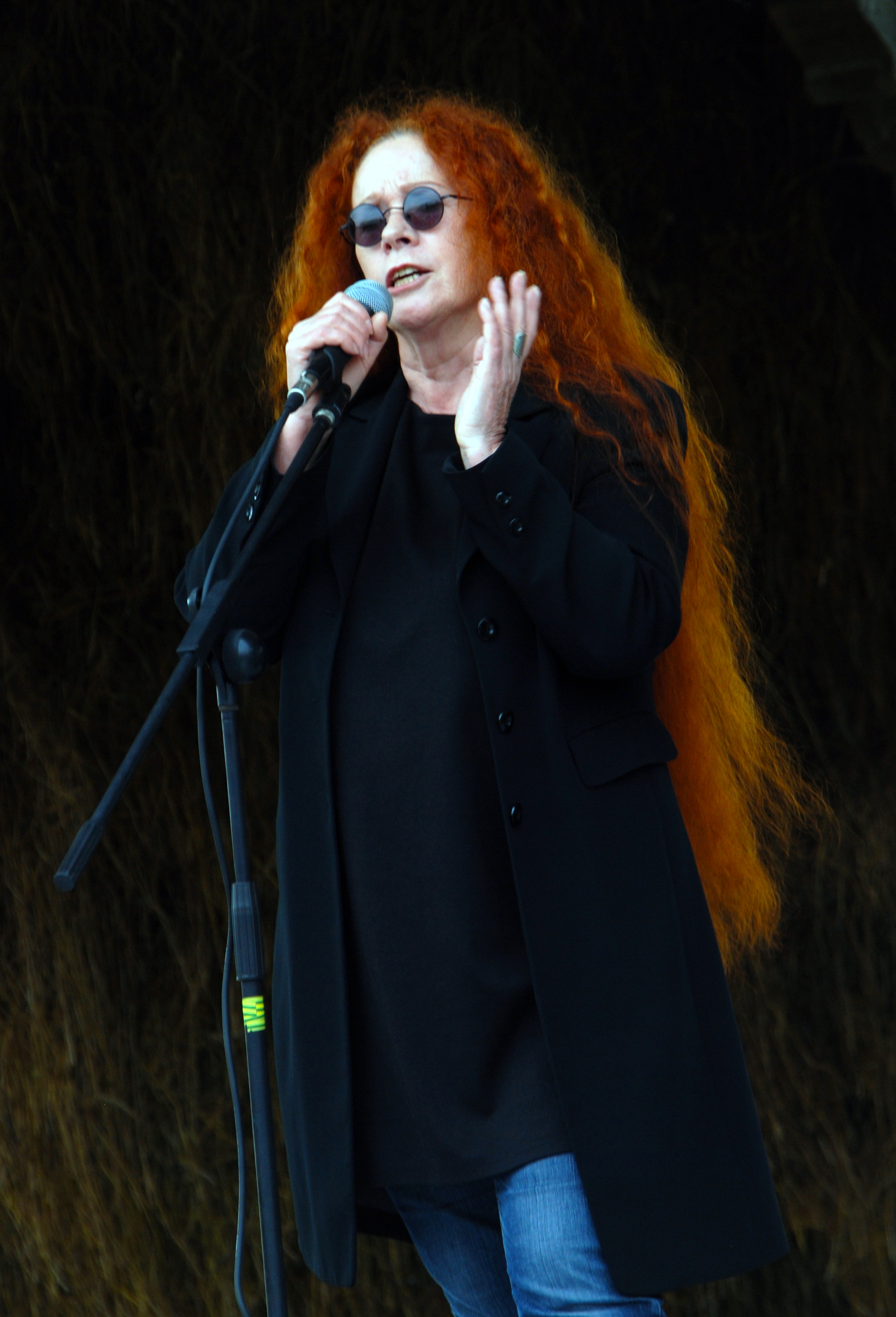 Neca Falk, na nastopu v Šentrupertu, 2014.